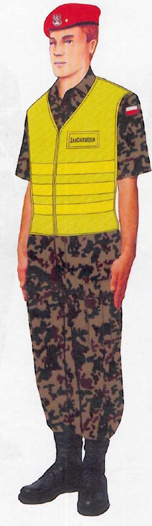 Mundur służbowy ŻW WKRD